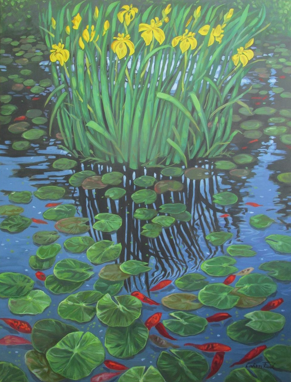 È uma pintura duma paisagem realizada com técnica de óleo/tela, muito calma e que inspira tranquilidade. Pertence a "Serie Estanques"